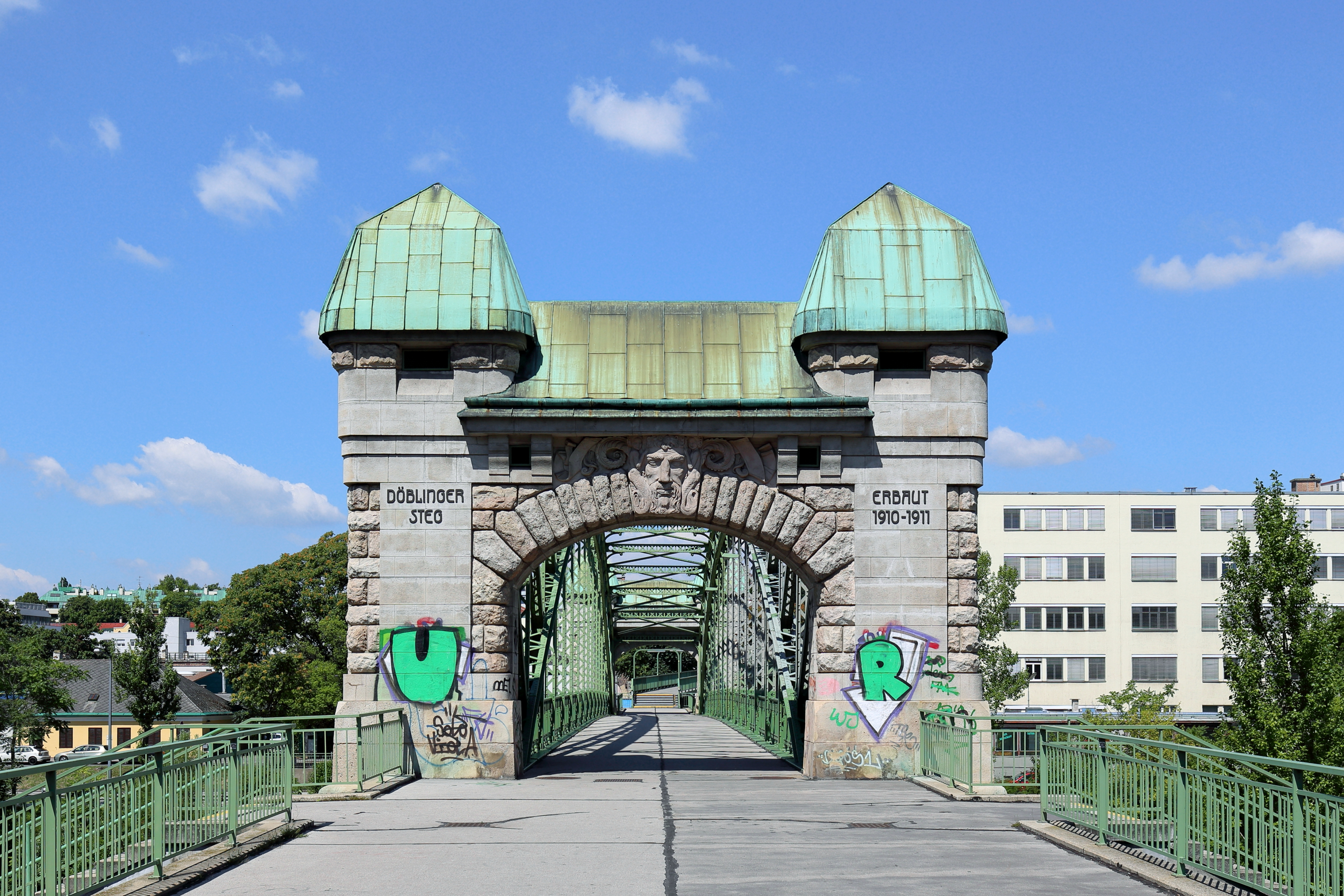 Ostansicht des Döblinger Steges. Er führt über den Donaukanal in Wien und verbindet die Bezirke Döbling und Brigittenau. Die Rohr- und Fussgängerbrücke wurde in den Jahren 1910/11 nach Plänen des Architekten Friedrich Jäckel errichtet.